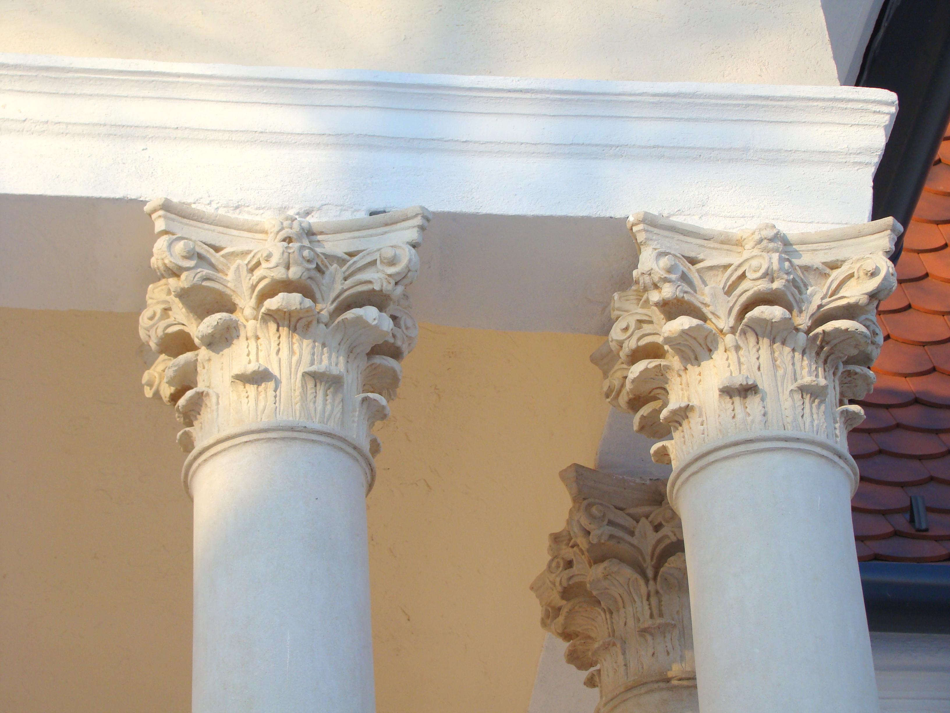 Ansamblul conacului Zichy, sat Voivodeni; comuna Voivodeni, judeţul Mureş